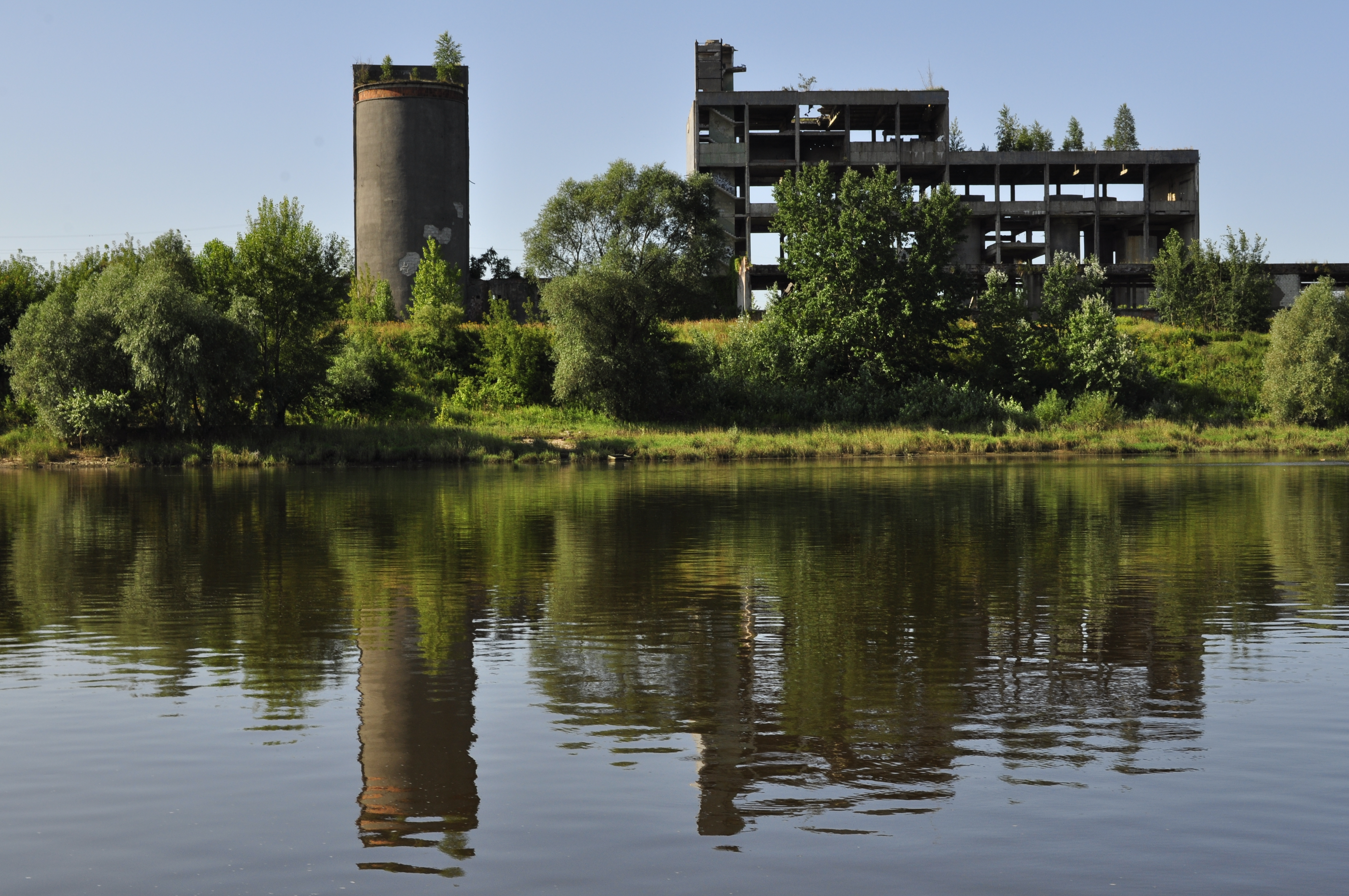 Dawny budynek fabryki papieru w Włocławku